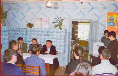 Төлеби орталықтандырылған кітапханалар жүйесі